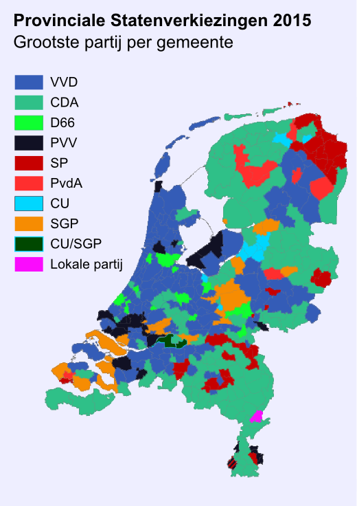 Thematische kaart van de Nederlandse Provinciale Statenverkiezingen van 18 maart 2015, met de uitslag (grootste partij) per gemeente